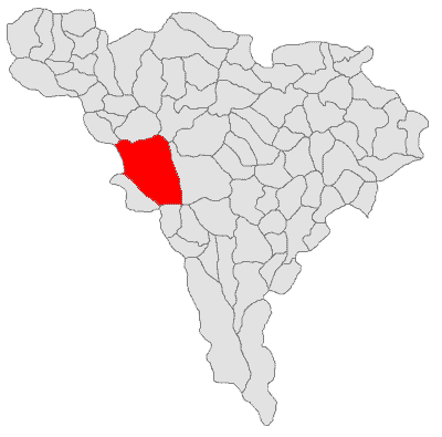 Categorie:Hărţi ale judeţului Alba